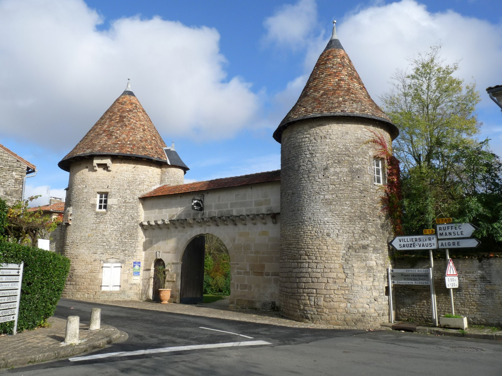 Logis des Tours, Villefagnan, Charente, France